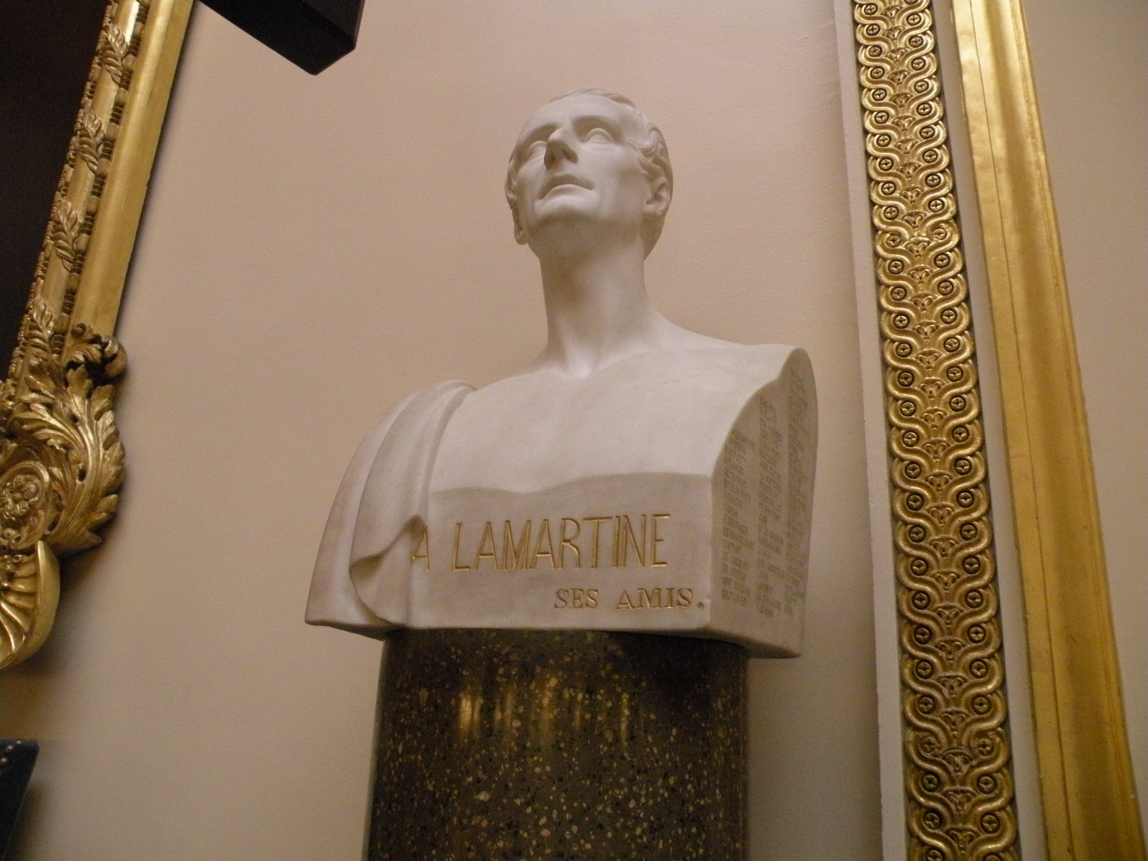 buste de lamartine dans la salle des conférences